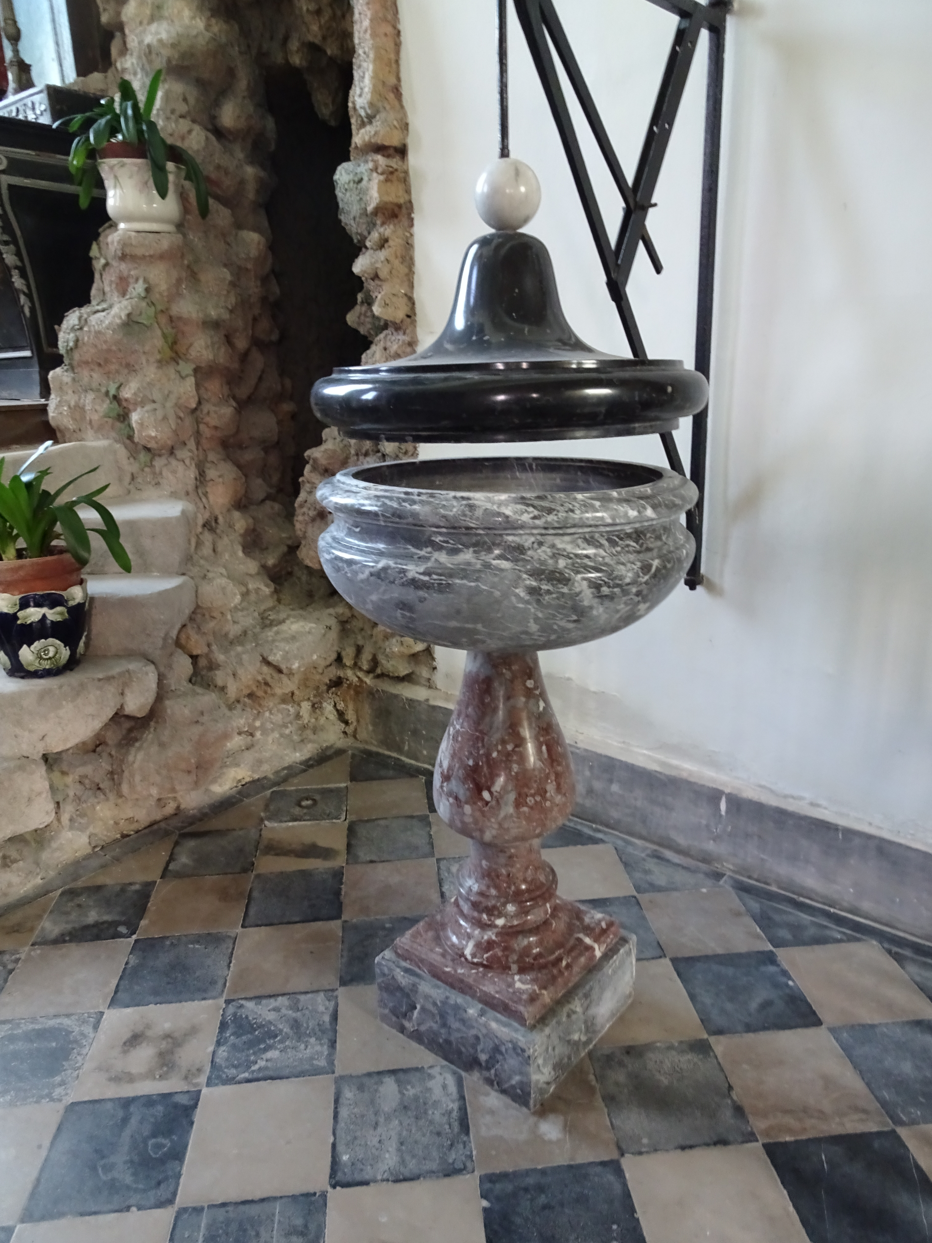 Baptistère de l'église Saint-Martin Terdeghem , Nord, France